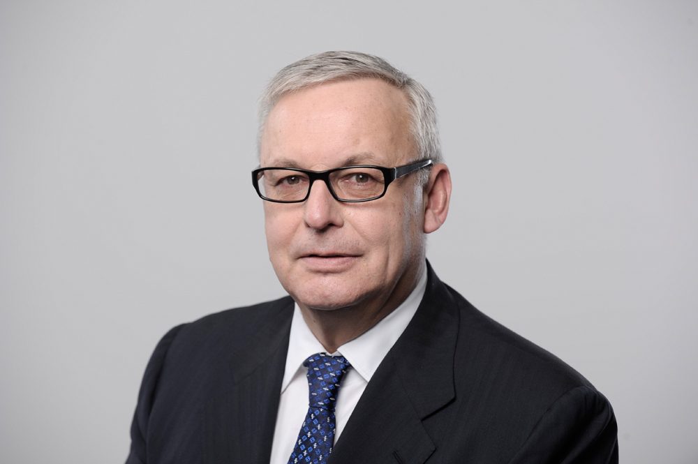 Werner Gegenbauer, Vorsitzender des Aufsichtsrates